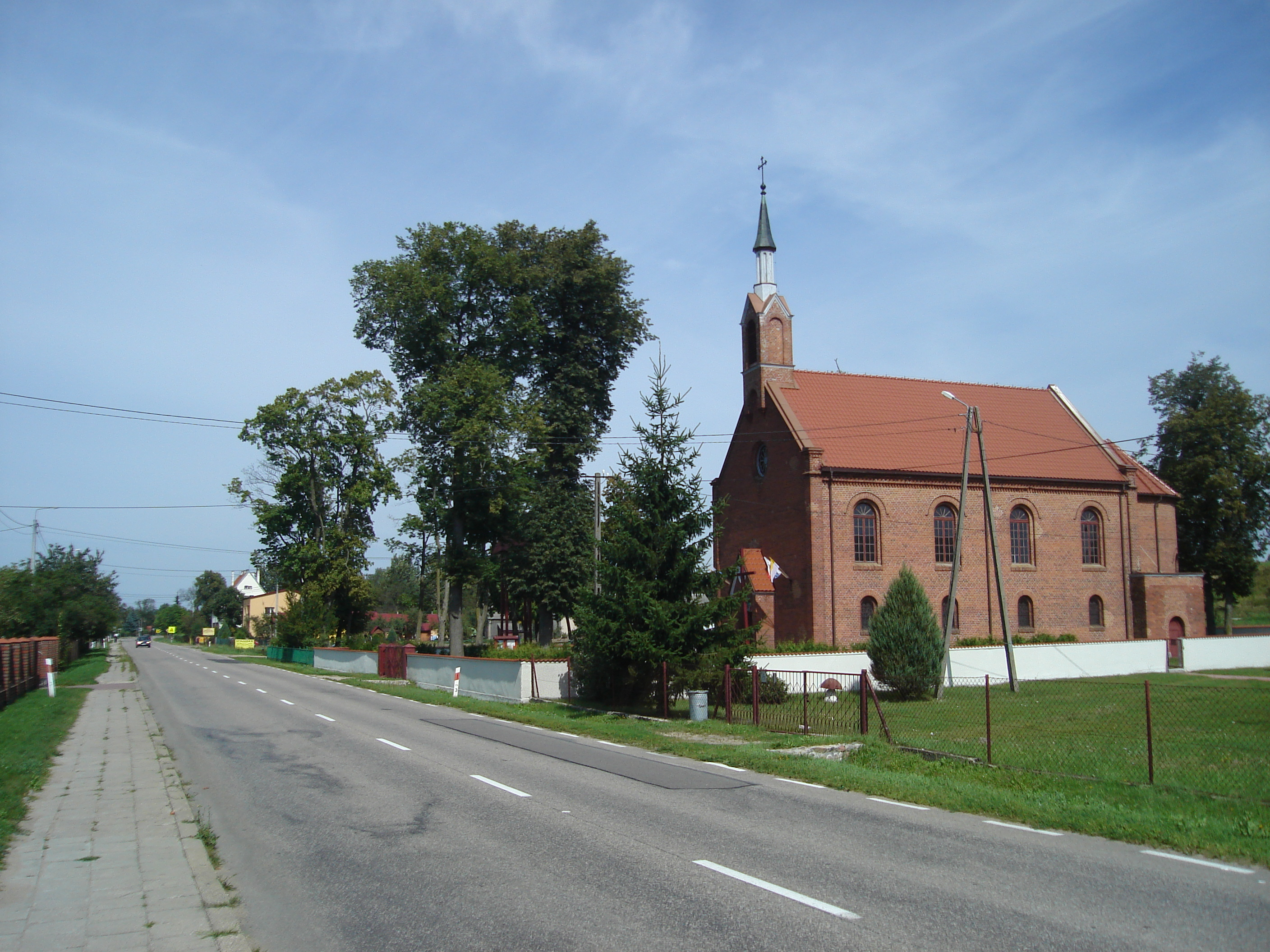 Kościół w Jeżach